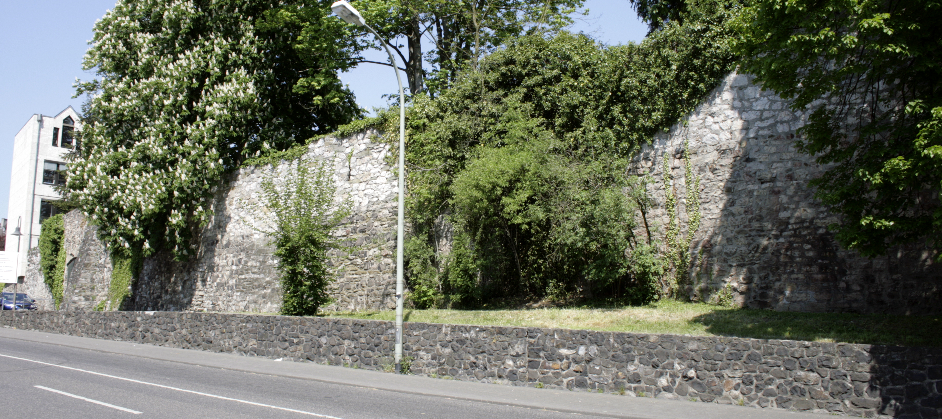 Rest der Stadtmauer von Limburg, Deutschland